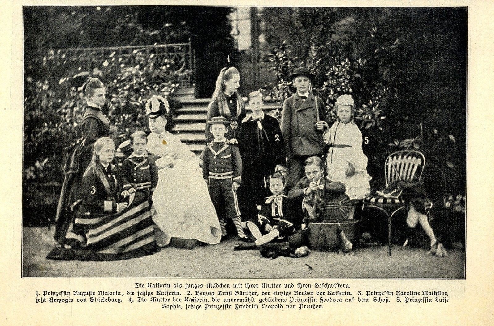 Die spätere Kaiserin Auguste Viktoria als junges Mädchen mit ihrer Mutter und ihren Geschwistern